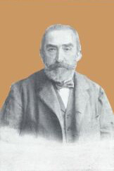 Szamosi János (1840-1909) bölcsész, kolozsvári egyetemi tanár, rektor